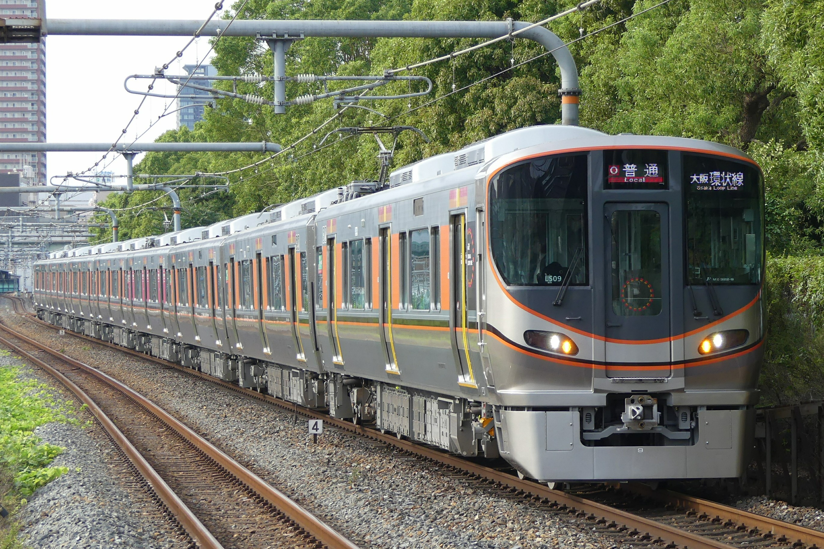 323系電車(大阪城公園駅)